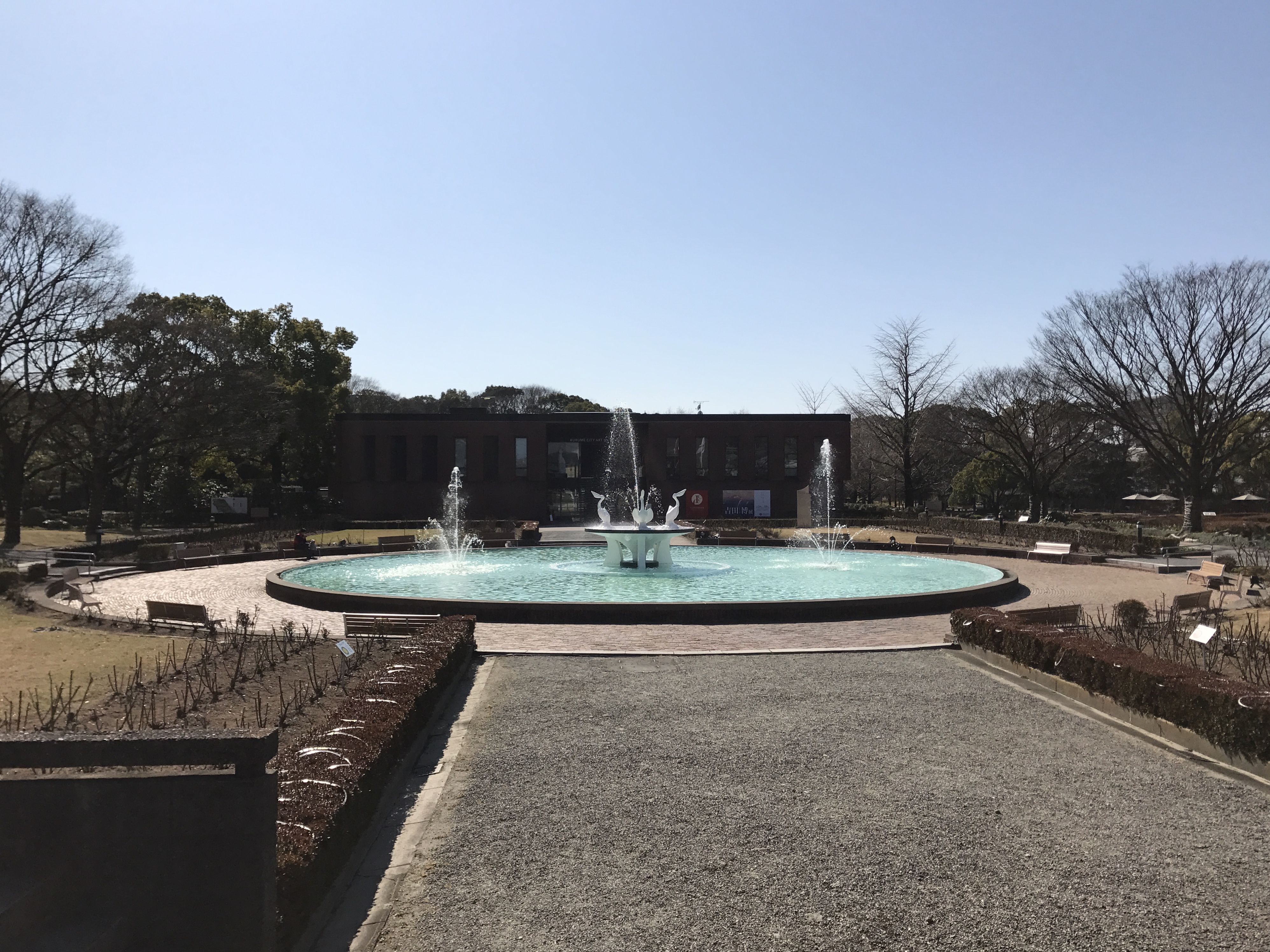 石橋文化センターのペリカン噴水と久留米市美術館